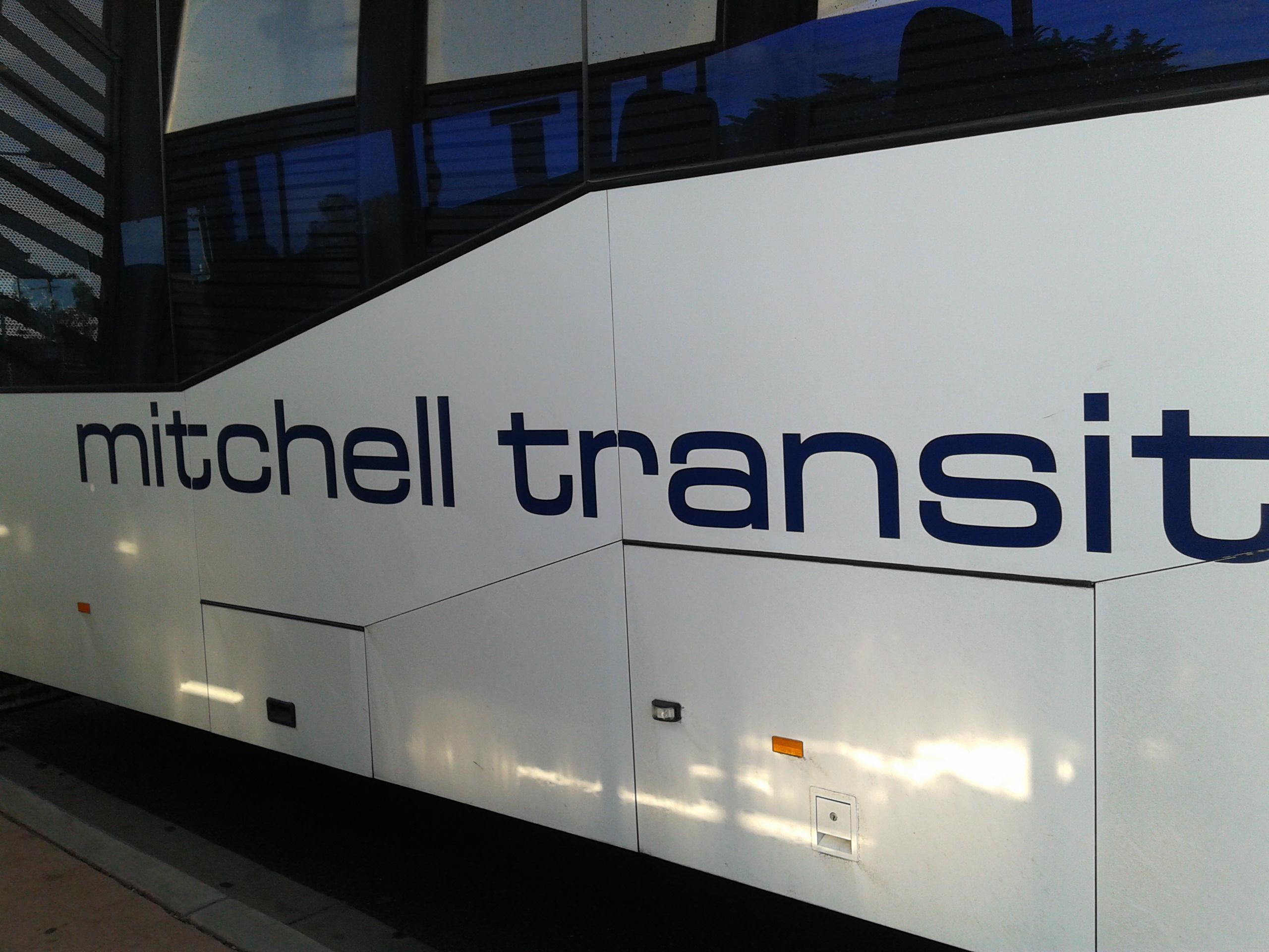 Mitchel Transit Bus